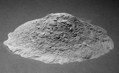 Ein Haufen Flugasche